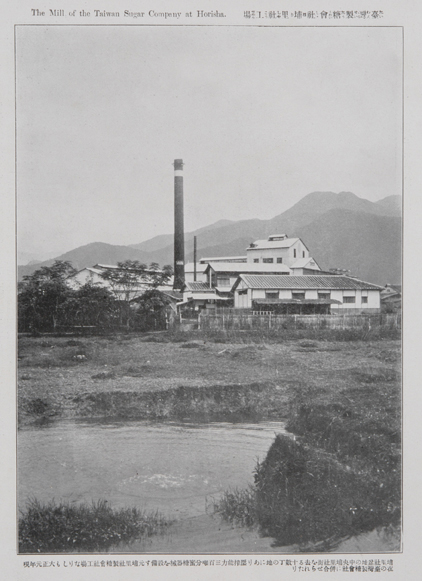 臺灣製糖會社埔里社工場Workshop of Taiwan Sugar Company in Pulishe branch